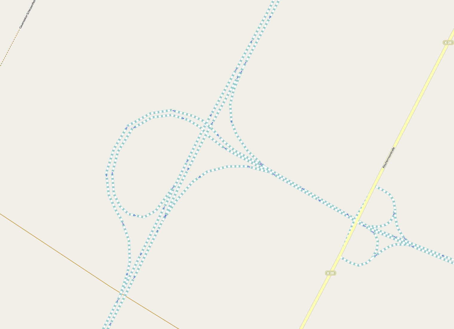 Lage des ehemals geplanten Autobahndreiecks Drochtersen (A26/A20). Es wurde ersetz durch die Planung für ein Autobahnkreuz. This map may be incomplete, and may contain errors. Don't rely solely on it for navigation.